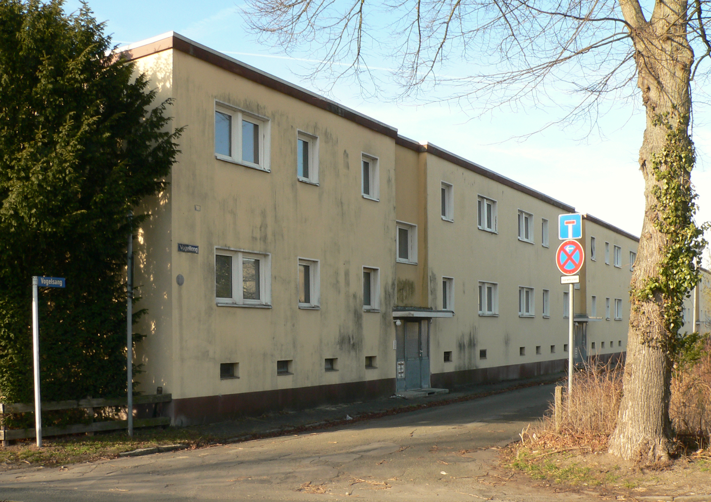 Siedlung Blumläger Feld in Celle, leerstehende Wohnhäuser